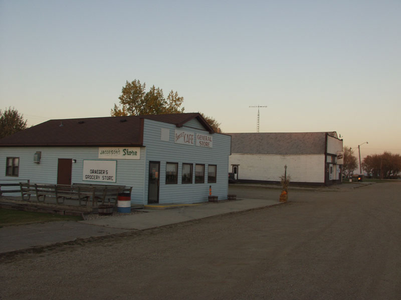 Brocket, North Dakota. From .